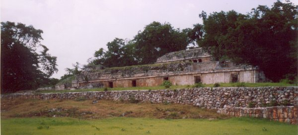 Palace of Labna, a maya site